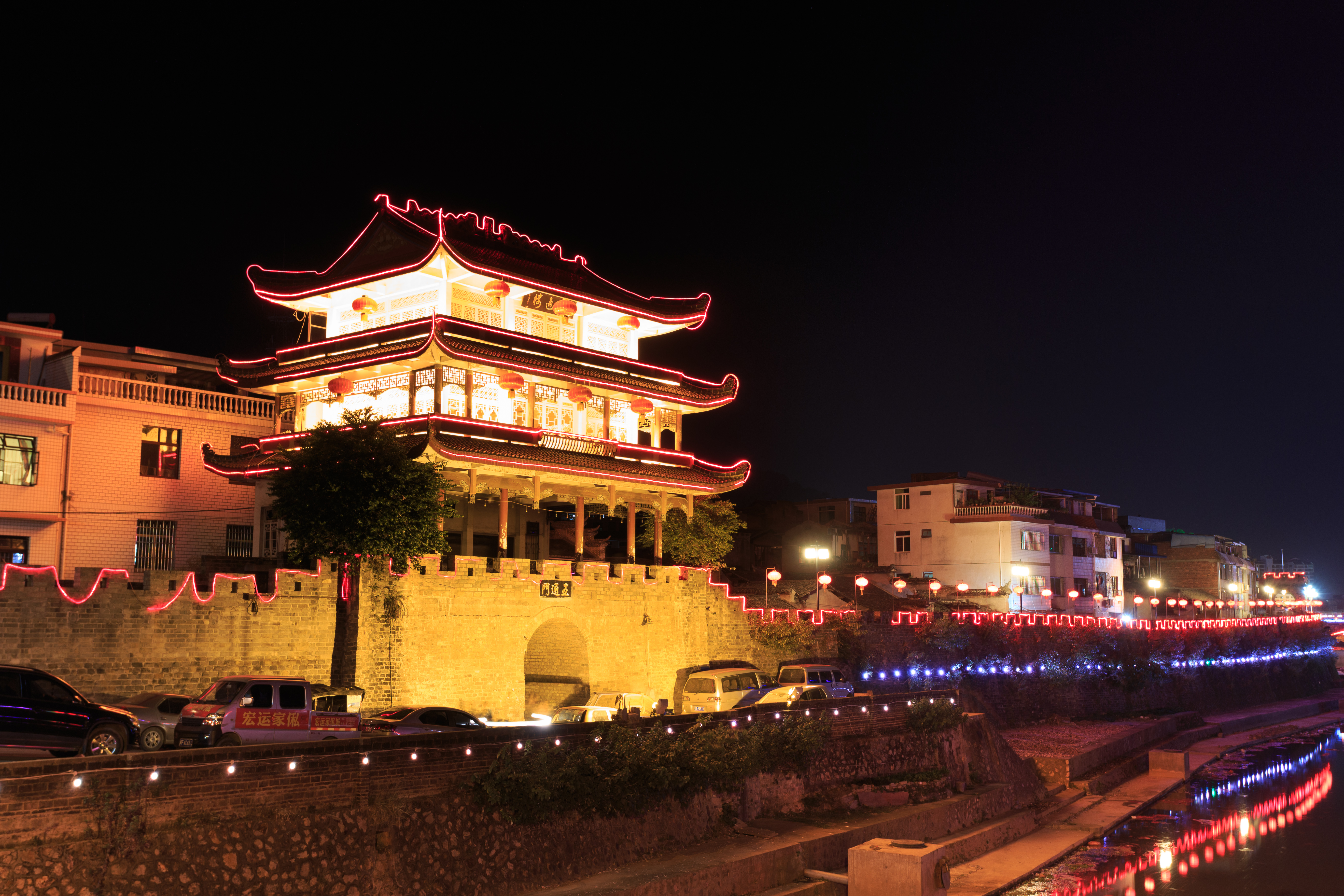 福建省长汀县城墙—— 五通门